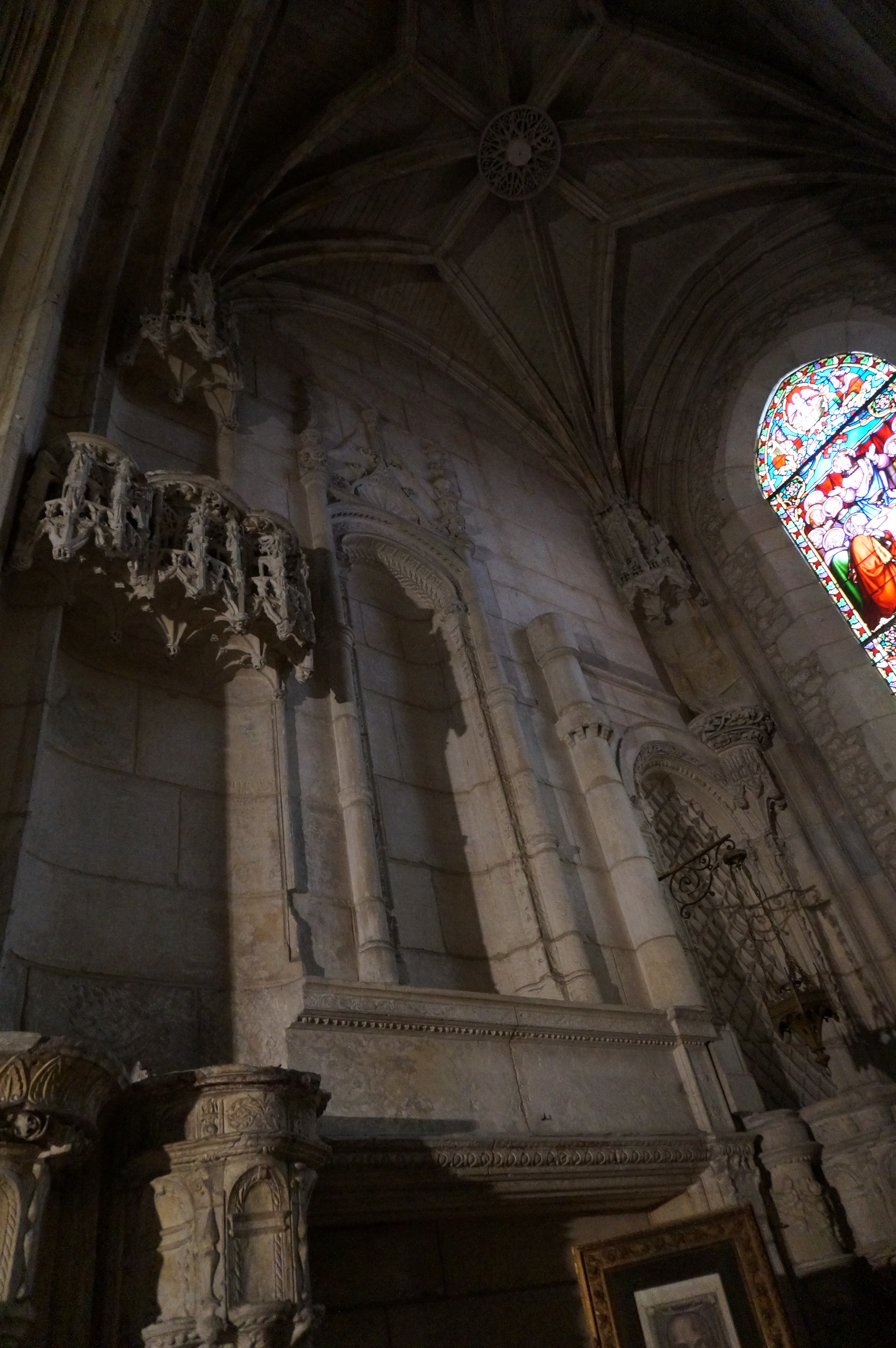 Dans la chapelle de la cathédrale.